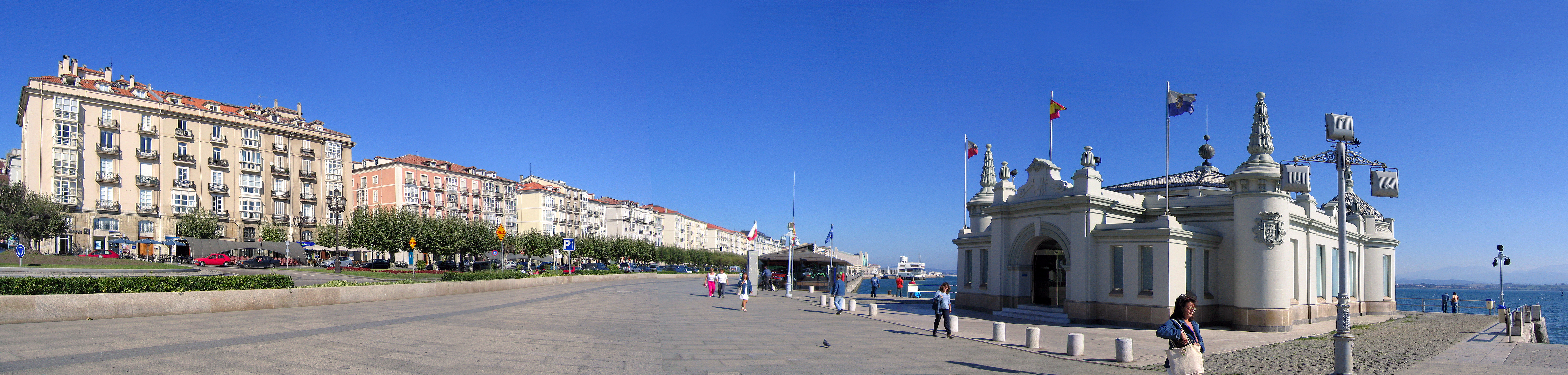 Santander. Palacete del Embarcadero. Calle Paseo de Pereda. Cantabria. Spain, 2005.